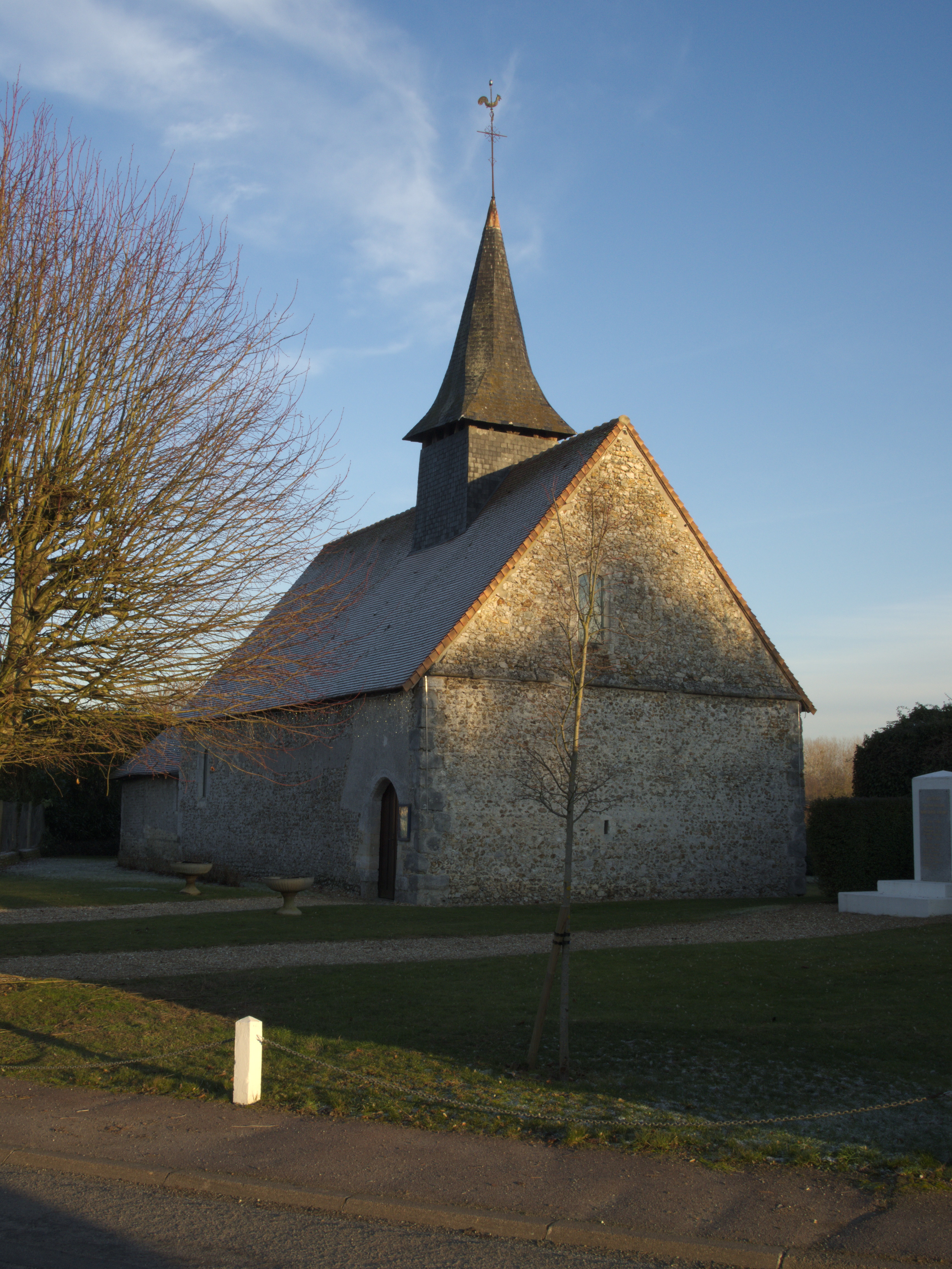 église Saint-Pierre d'Aulnay-sur-Iton, vue vers l'Est